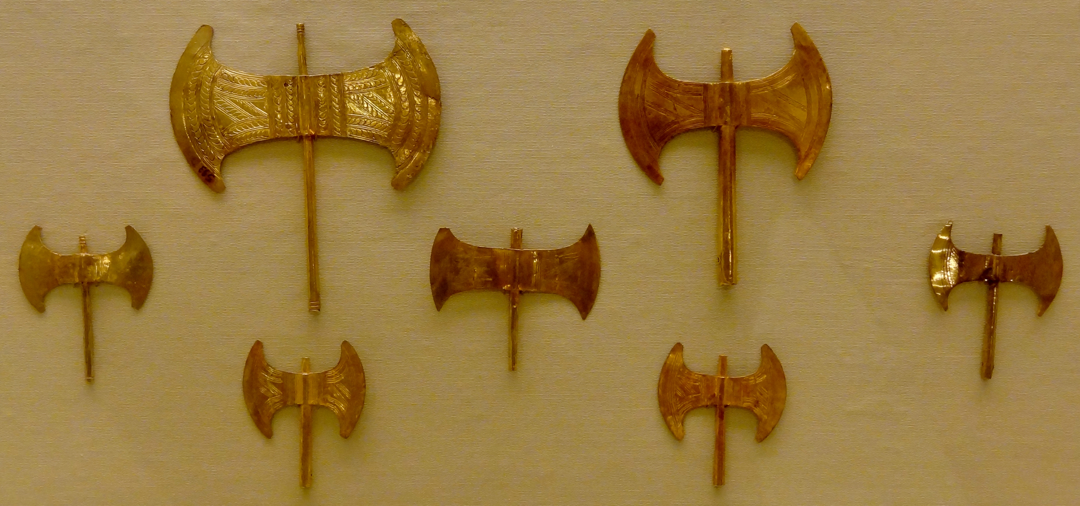 Goldene Votivdoppeläxte mit Ritzverziehrung (Neupalastzeit 1700–1600 v. Chr.) aus der Höhle von Arkalochori, ausgestellt im Archäologischen Museum Iraklio, Kreta, Griechenland